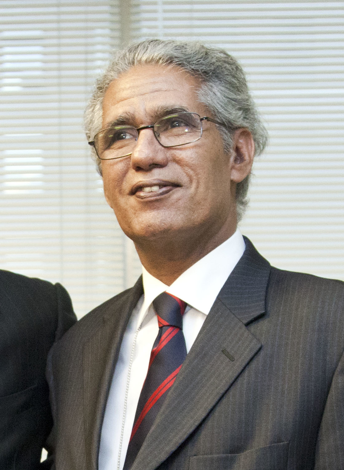 Nueva York (Estados Unidos), 26 de septiembre 2013. Los Cancilleres de Ecuador y de la República Árabe Saharaui, Ricardo Patiño y Mohamed Ould Salek, mantuvieron una reunión bilateral en el marco de la 68 Asamblea General de la ONU. Foto: Fernanda LeMarie - Cancillería del Ecuador.